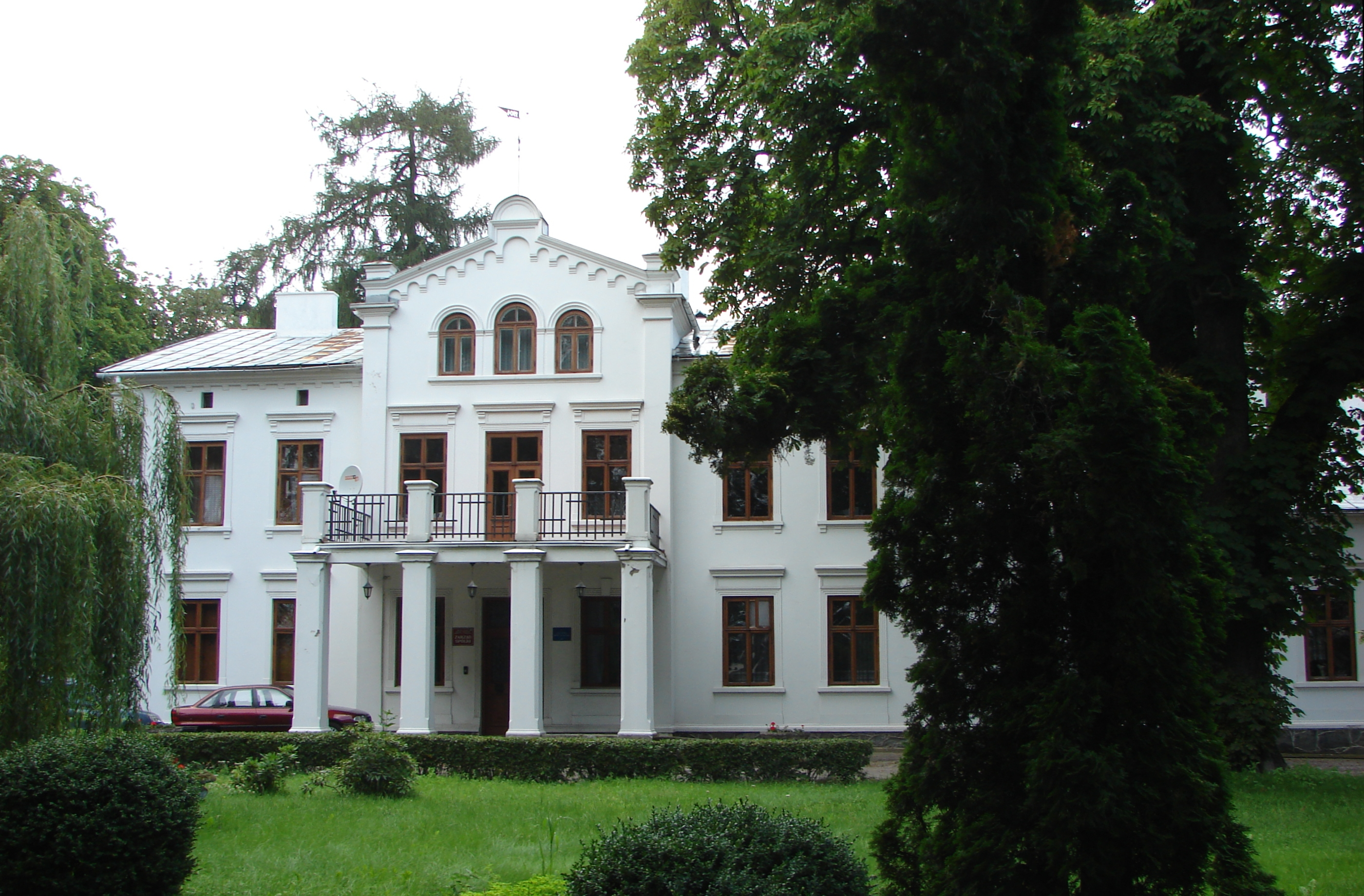 Chodeczek, Gmina Chodecz. Manor house, built 1904-1906